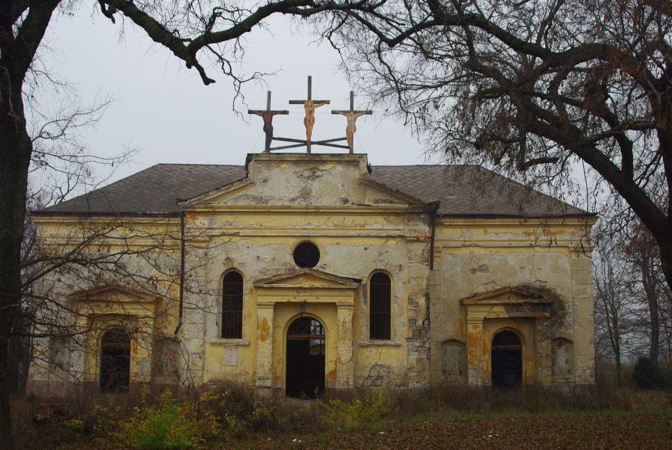 Kálvária Gyöngyös